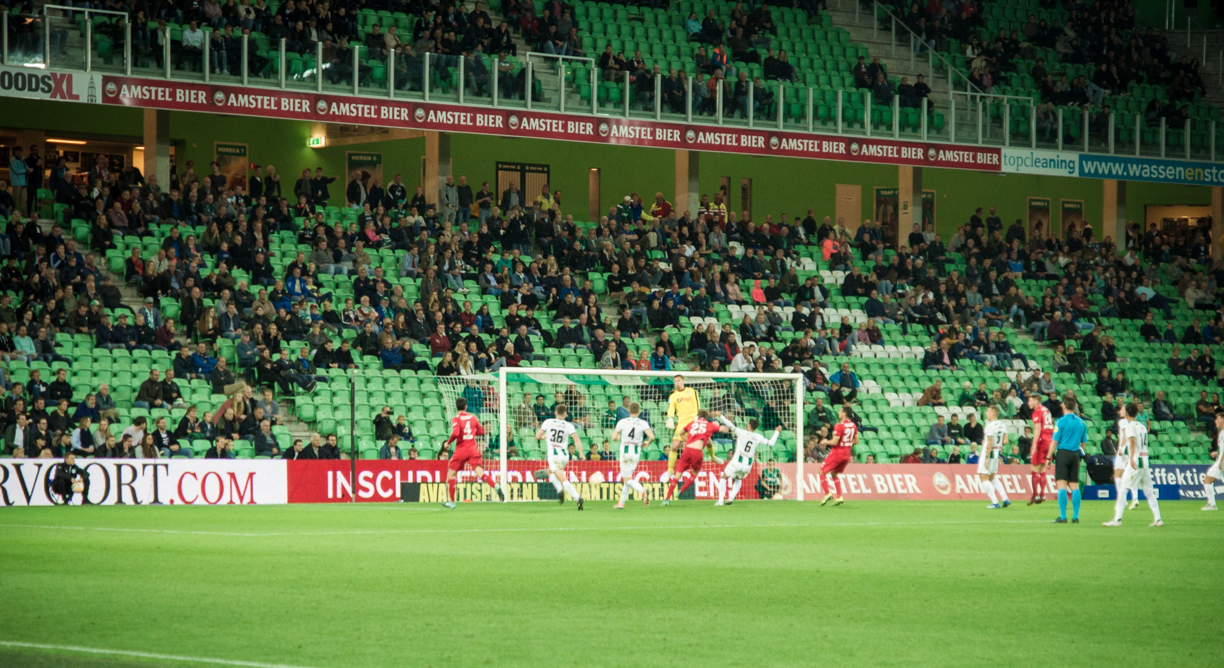 Peet Bijen scoort de 0-2 in de bekerwedstrijd FC Groningen-FC Twente op 27 september 2018